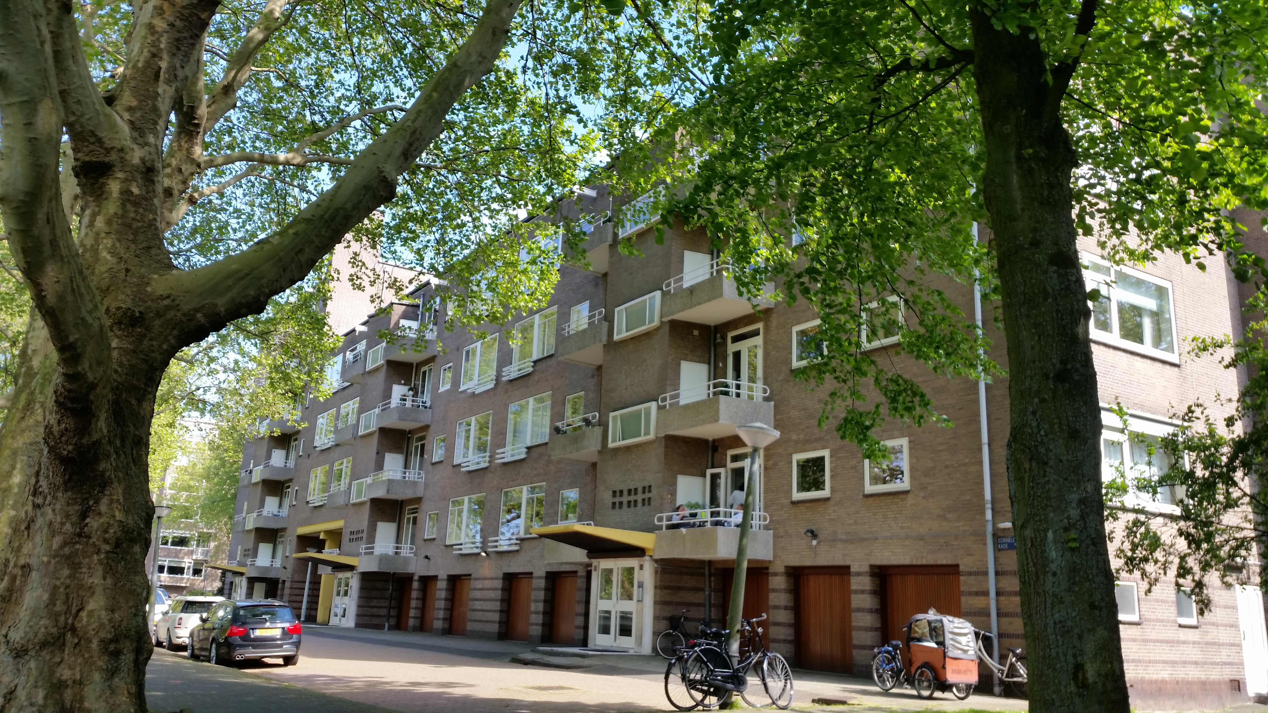 Overzicht van Cornelis Dopperkade 7-12, Amsterdam